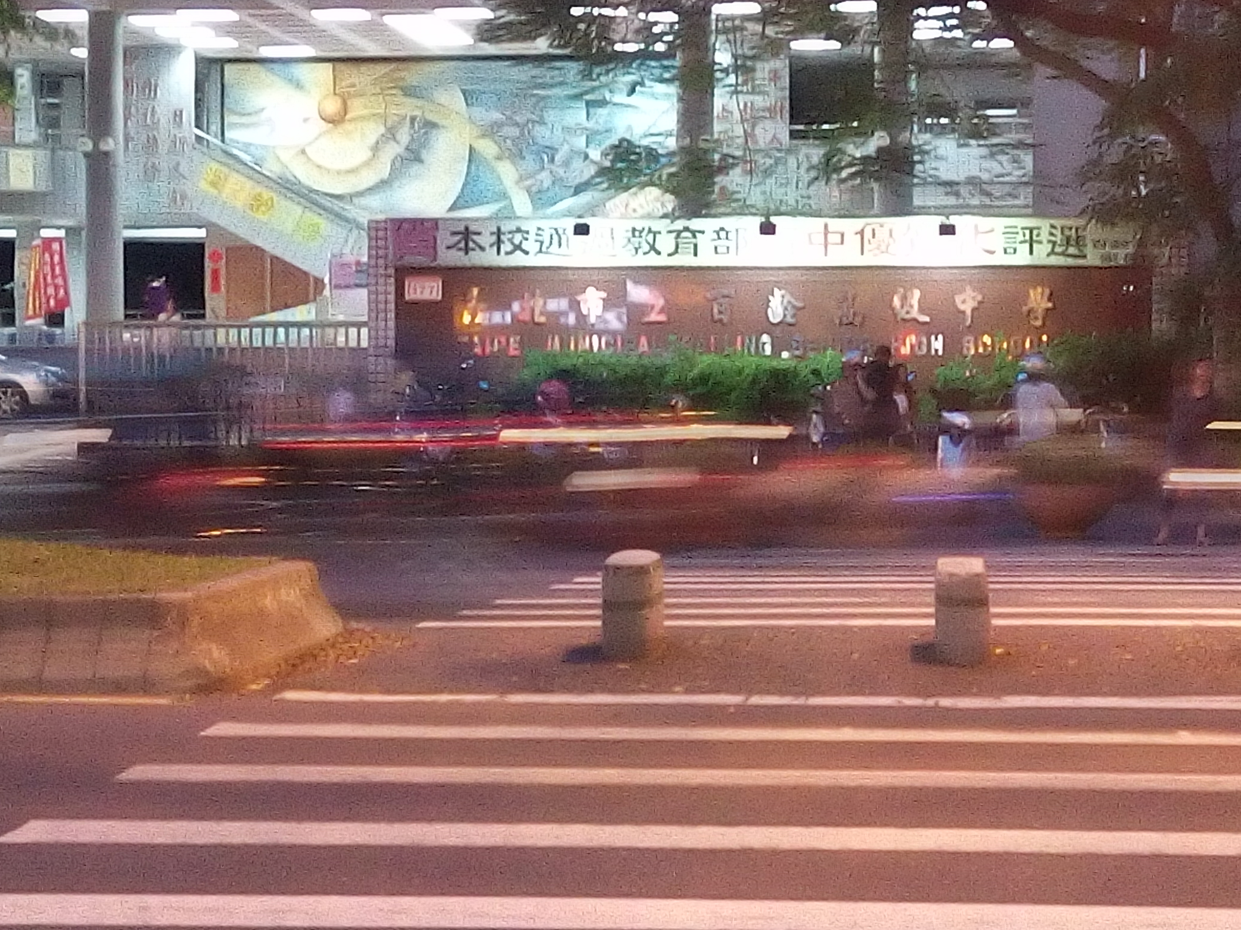 中文（台灣）: 臺北市立百齡高級中學校門。